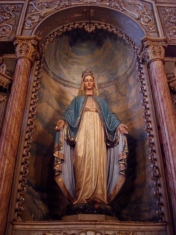 Anônimo: Nossa Senhora da Conceição, na Igreja da Conceição em Porto Alegre. Meados do século XIX.